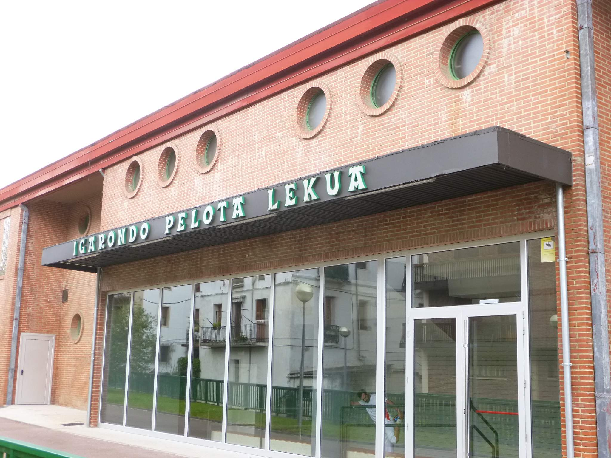 Igarondo Pelota Lekua (Idiazabal, Gipuzkoa)